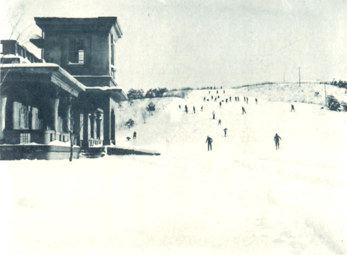 富山県上瀧公園（上滝公園）